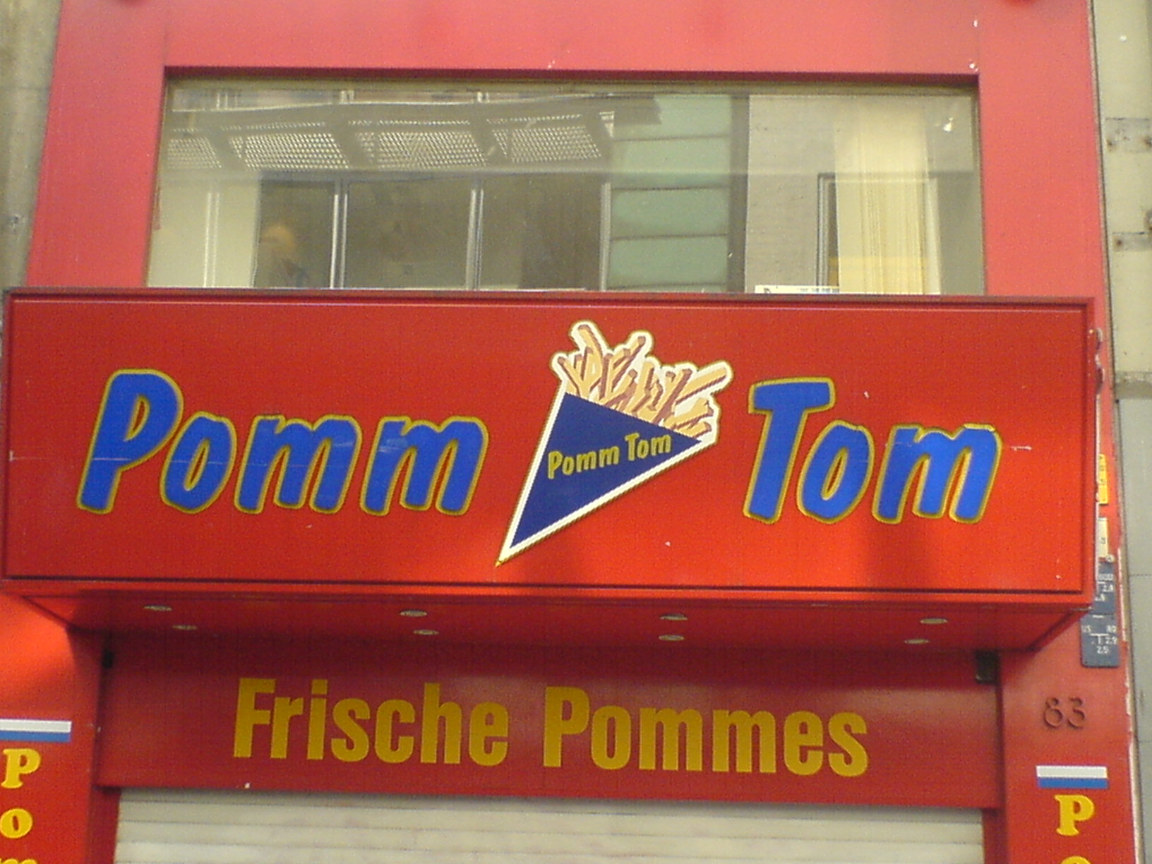 Germana kafeterio.